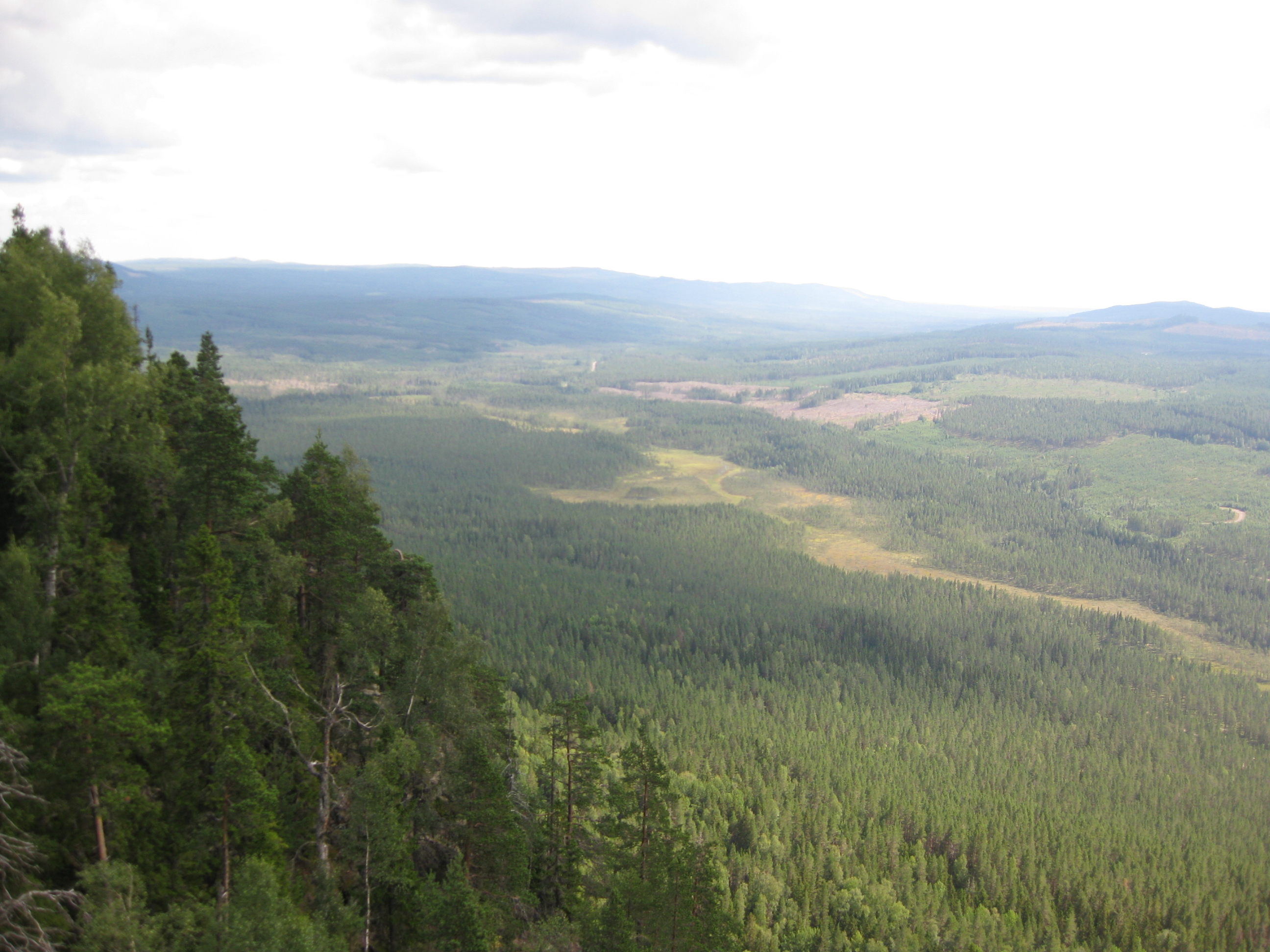 Utsikt från Hykjeberg i Dalarna.